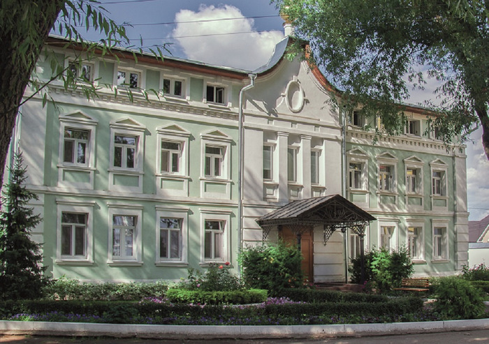 Келейный корпус с архиерейскими покоями и домовой церковью в честь преподобного Сергия Радонежского.